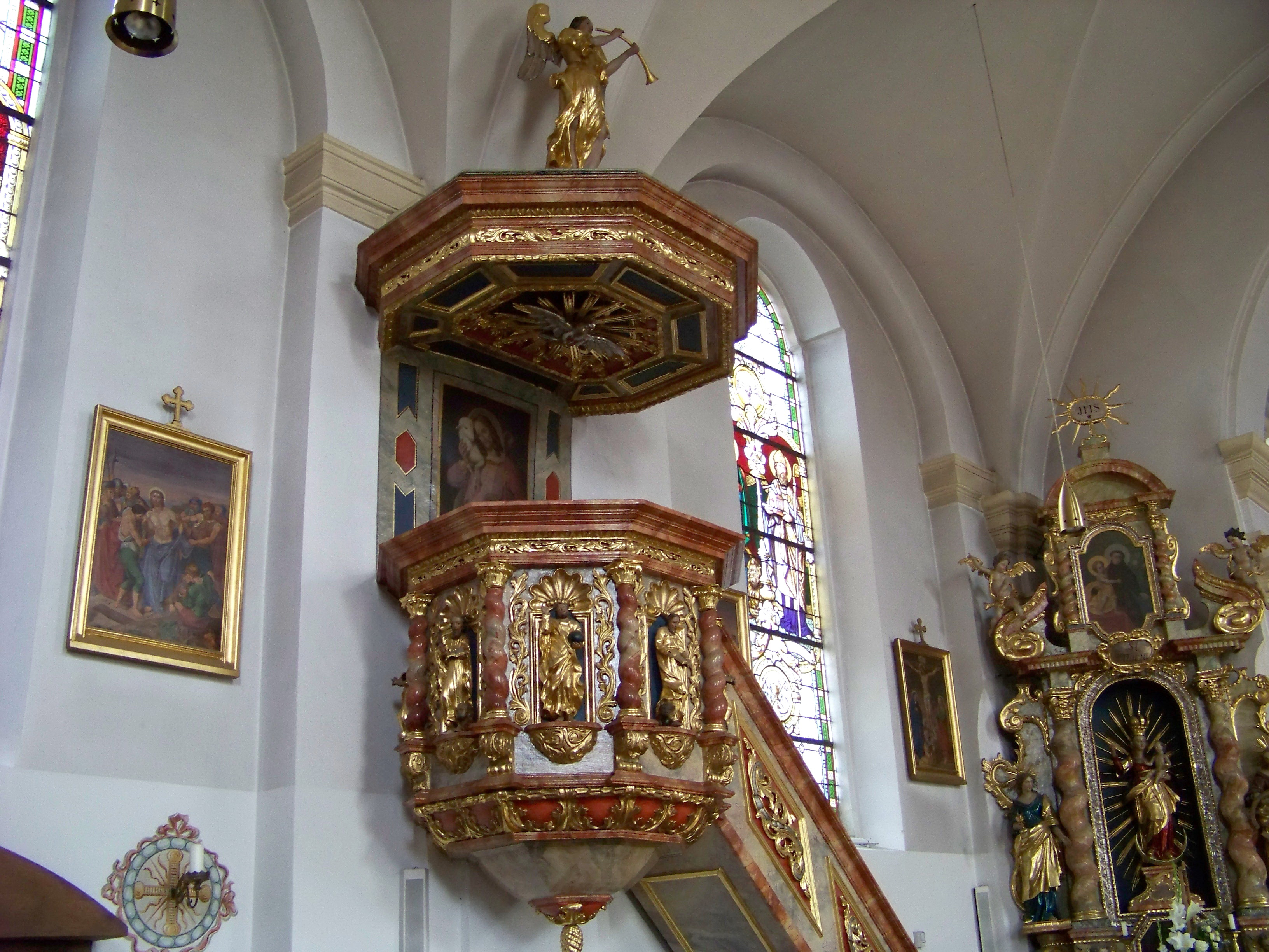 Weihmichl, Hauptstraße 24. Pfarrkirche St. Willibald. Saalkirche mit eingezogenem Chor, Langhaus und Chor barock. Barocke Kanzel mit gewundenen Ecksäulchen. Figuren der vier Evangelisten in den Feldern. Auf dem Schalldeckel Engel mit Posaune.